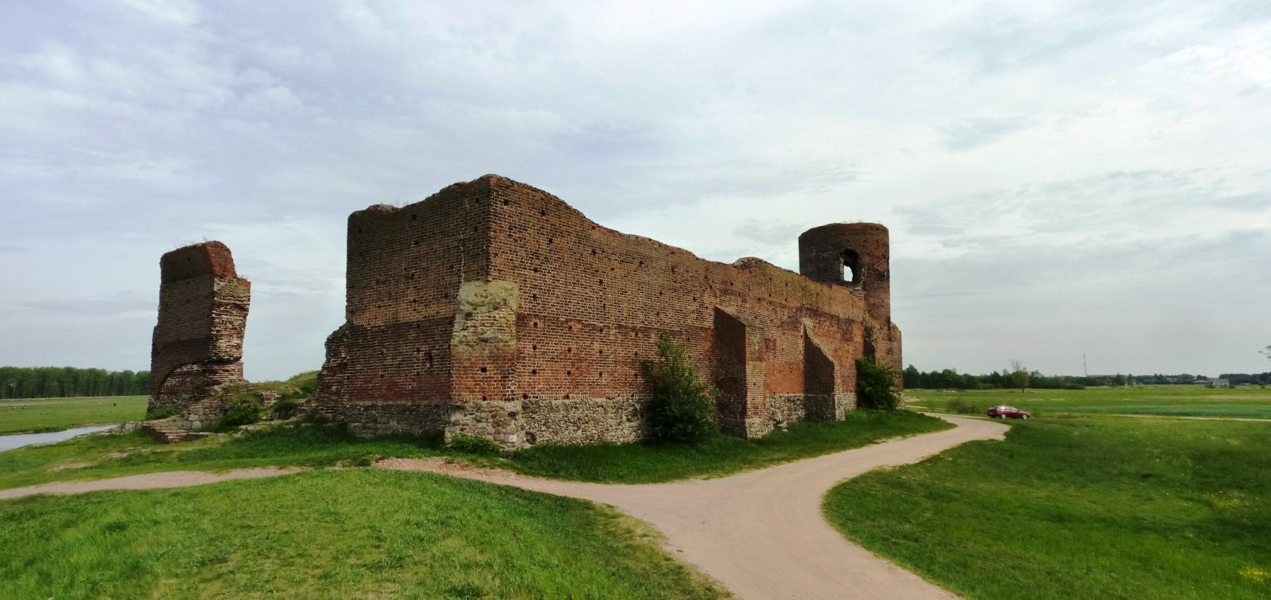 Panorama ruin zamku w Kole, widok od strony zachodniego narożnika.